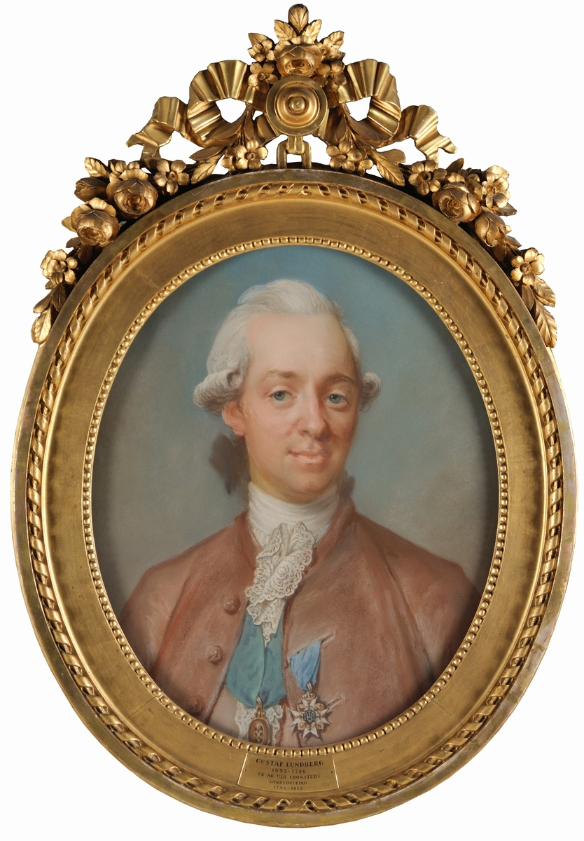 Cronstedt är iklädd civil dräkt, och bärandes runt halsen Vasaordens kommendörstecken, samt på bröstet Serafimerordens tecken. Målning från 1777 av Gustaf Lundberg.